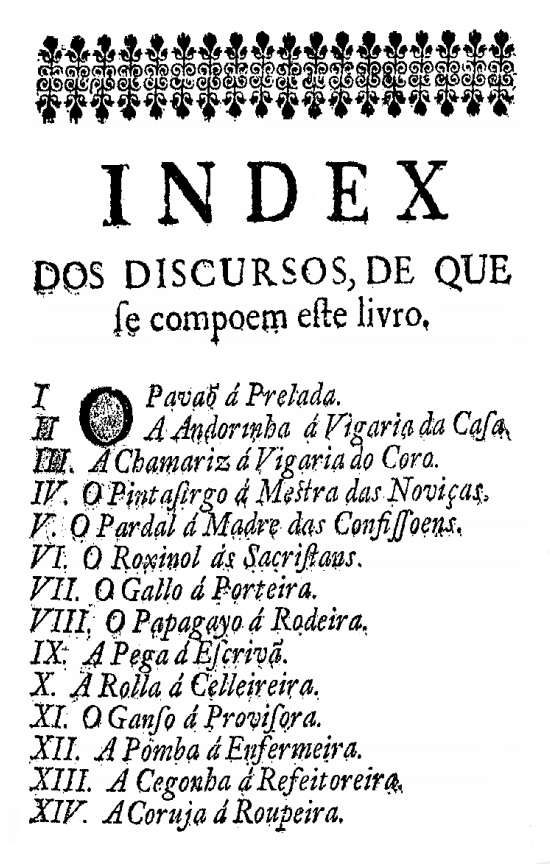 Aves Ilustradas de Sóror Maria do Céu (fl. 3v)